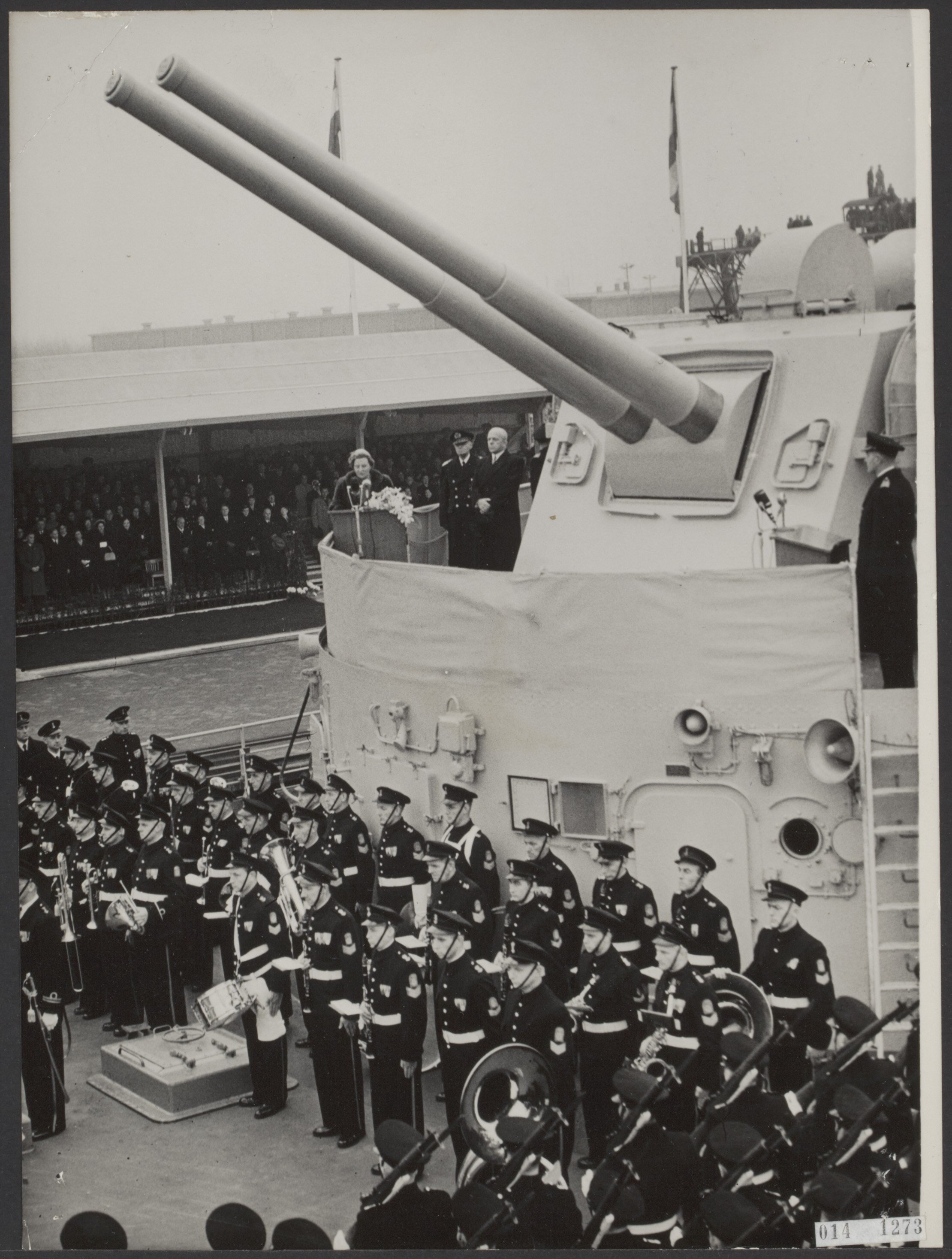 Collectie / Archief : Fotocollectie Elsevier Reportage / Serie : [ onbekend ] Beschrijving : koninklijk huis, koninginnen, redevoeringen, kruisers, muziekkorpsen, militairen, Juliana, koningin Datum : 18 november 1953 Locatie : Schiedam, Zuid-Holland Trefwoorden : koninginnen, koninklijk huis, kruisers, militairen, muziekkorpsen, redevoeringen Persoonsnaam : Juliana, koningin Instellingsnaam : HM De Ruyter Fotograaf : Fotograaf Onbekend / Anefo Auteursrechthebbende : Nationaal Archief Materiaalsoort : Foto (zwart/wit) Nummer archiefinventaris : bekijk toegang 2.24.05.02 Bestanddeelnummer : 014-1273